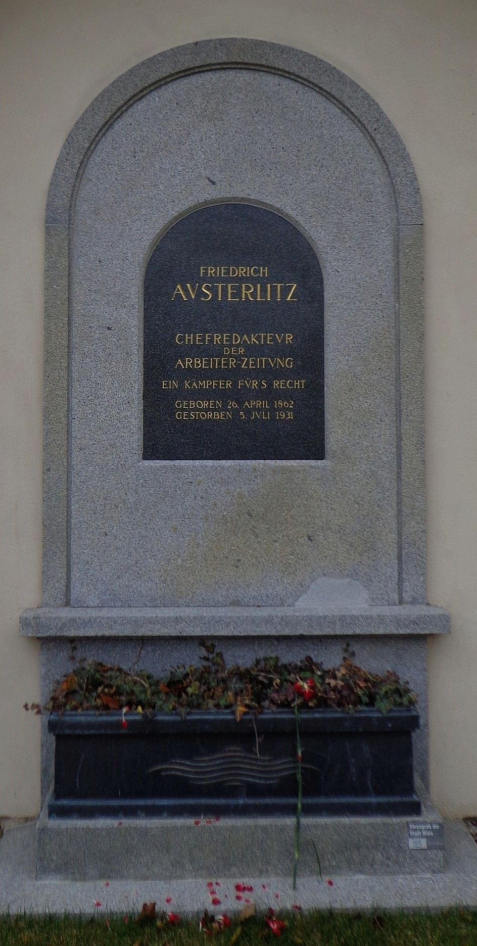 Feuerhalle Simmering - Abteilung ML (Umfassungsmauer): Urnengrab von Friedrich Austerlitz